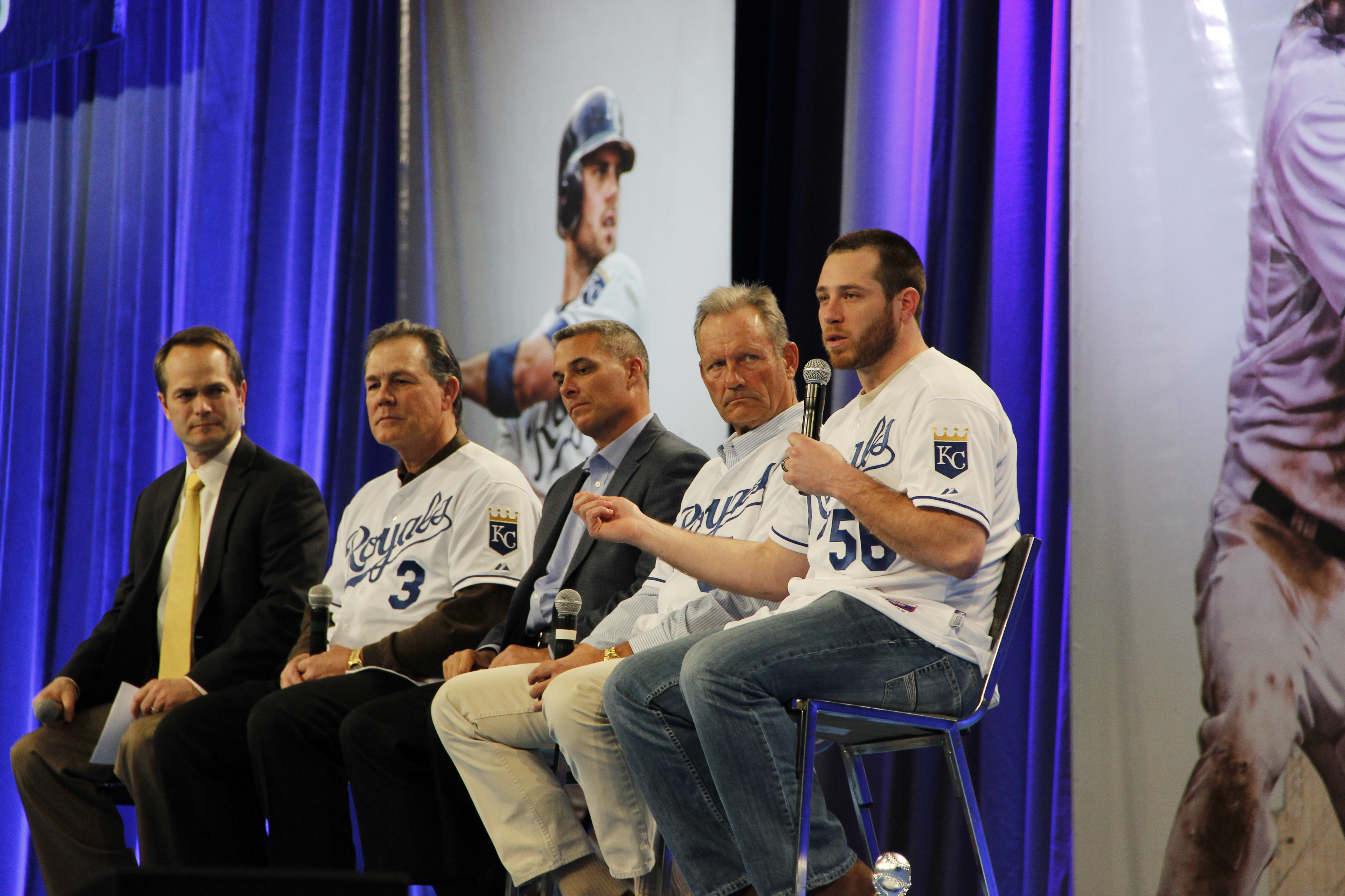 Royals FanFest 2014